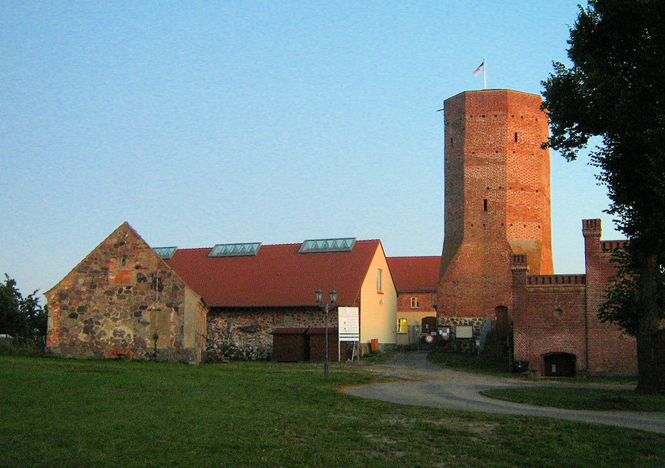 Blick auf die Burg Löcknitz im pommerschen Städtchen Löcknitz.